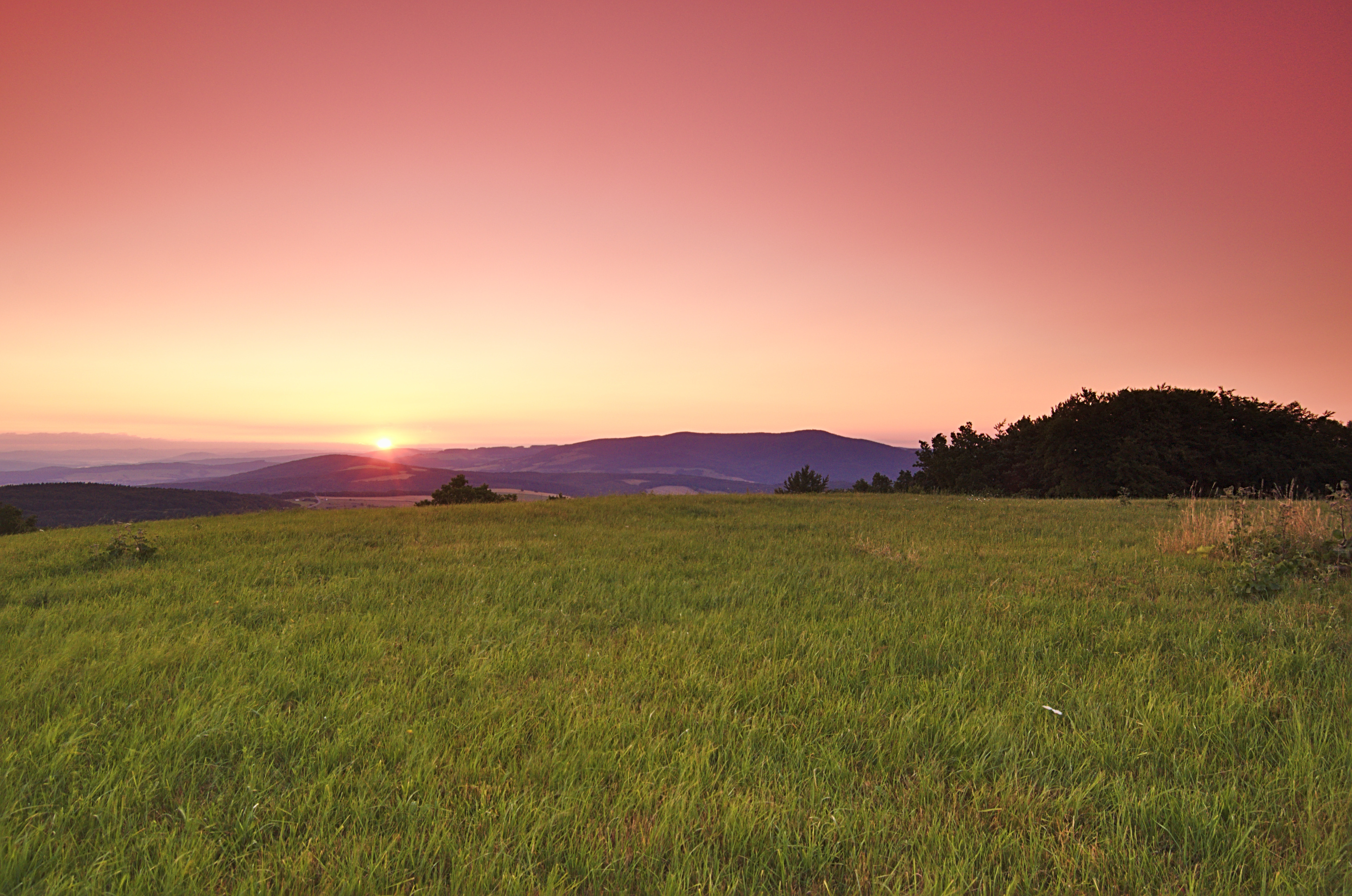 Východ slunce z kopce Lesná, okres Uherské Hradiště